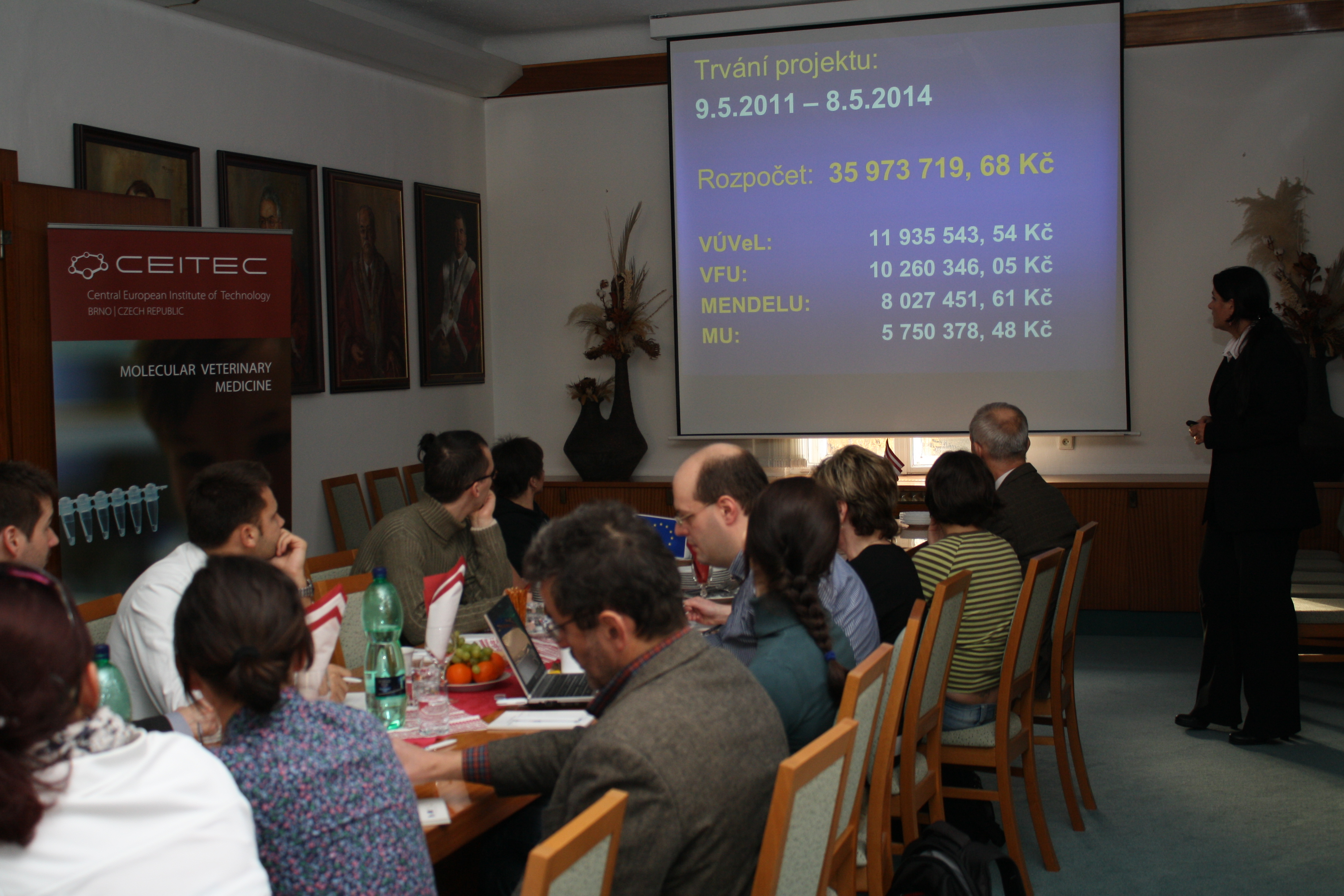 Projekt CEITEC